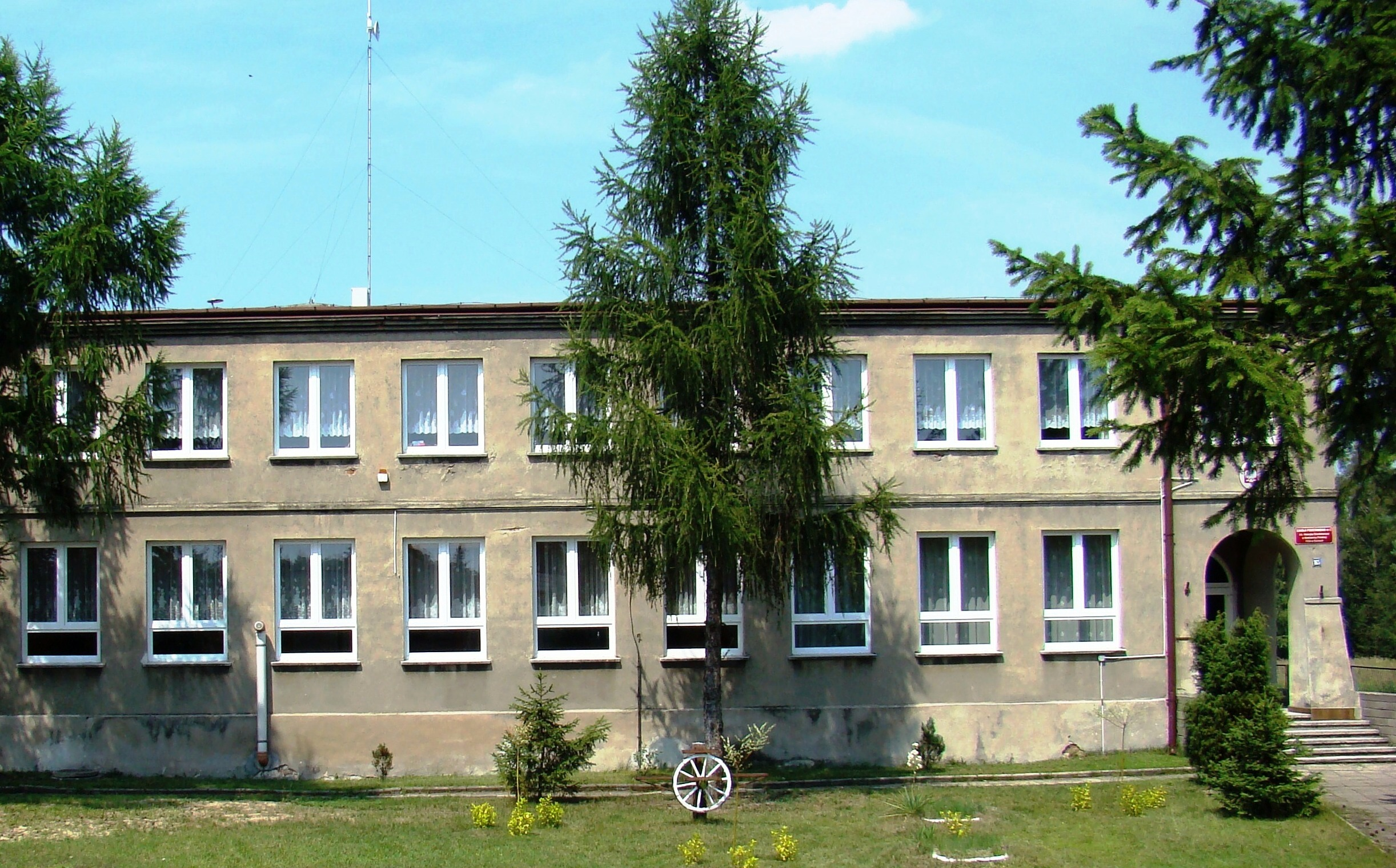 Szkoła Podstawowa nr 2 im Henryka Sienkiewicza w Kamienicy Polskiej, filia w Osinach